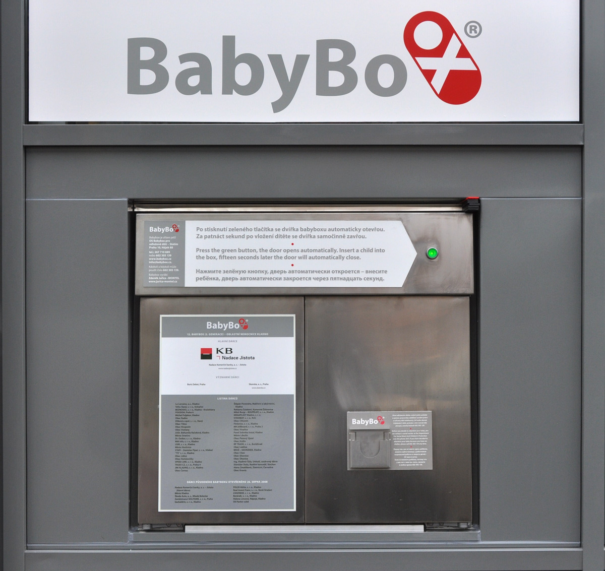 Venkovní pohled na český babybox nové generace.